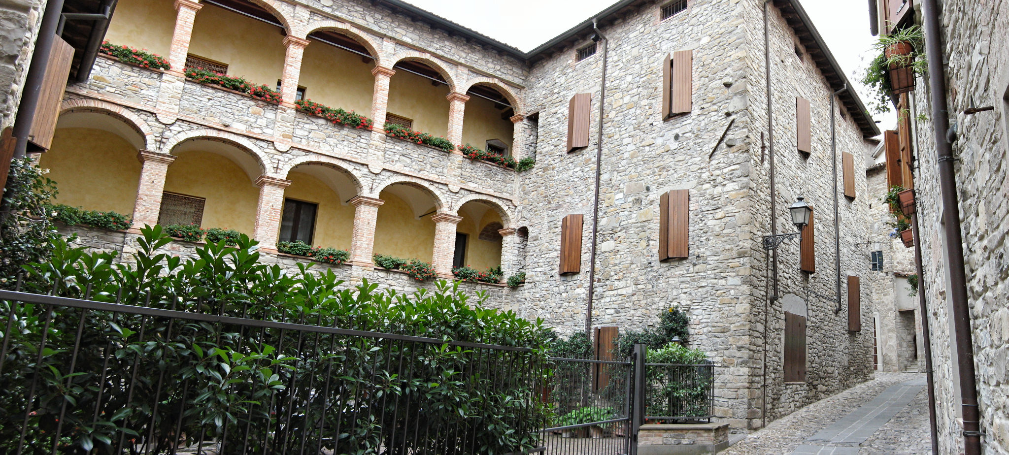 Calestano (PR)